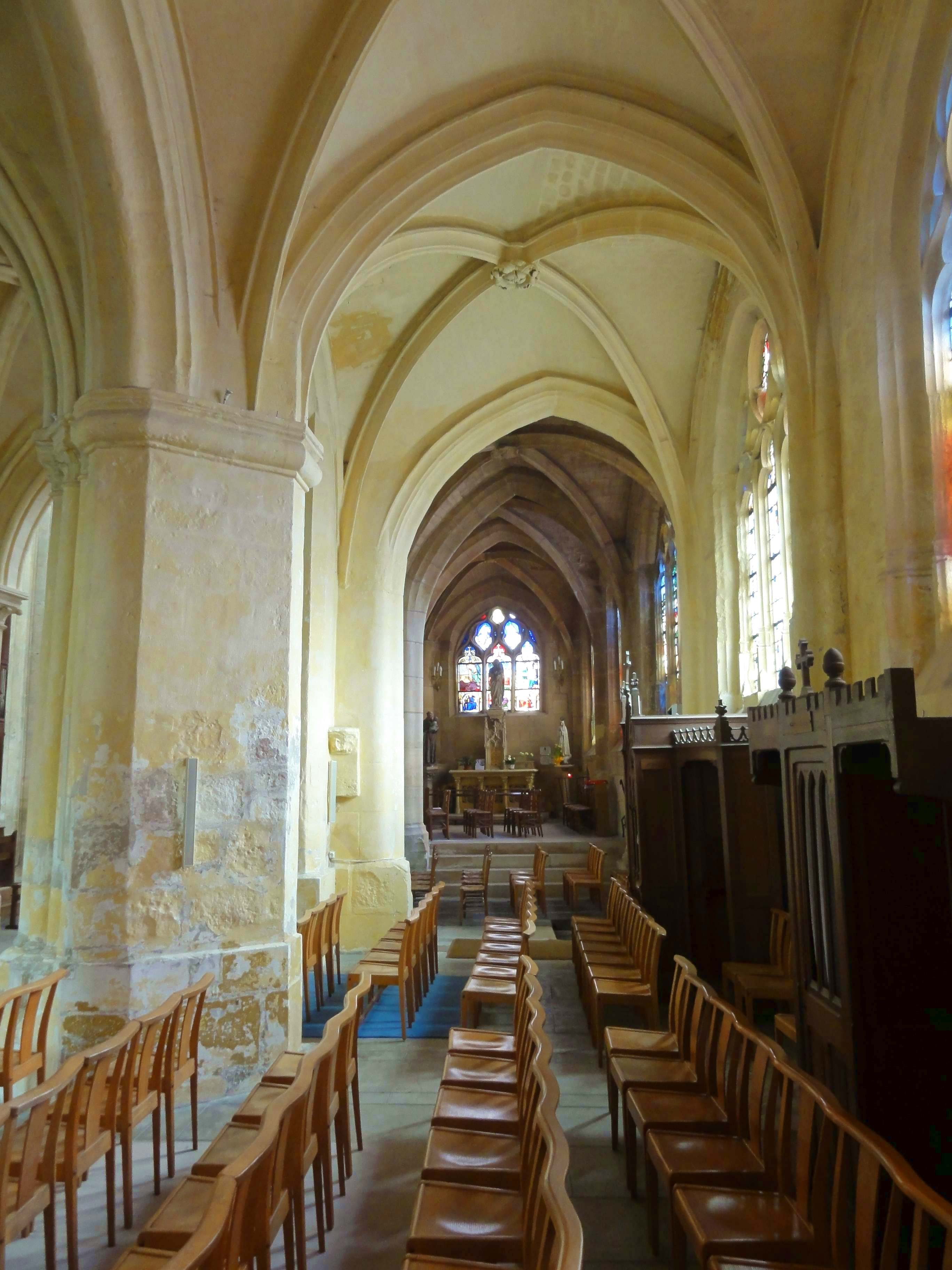 Intérieur de l'église - voir titre.